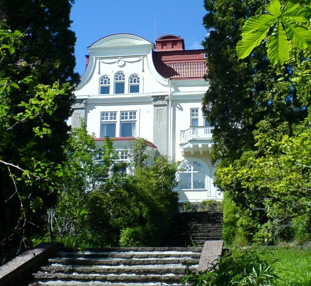 Fotograf Ingmar Engström